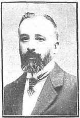 Retrato de Luis Morote, fotografía de Kaulak recogida en la revista española Nuevo Mundo.